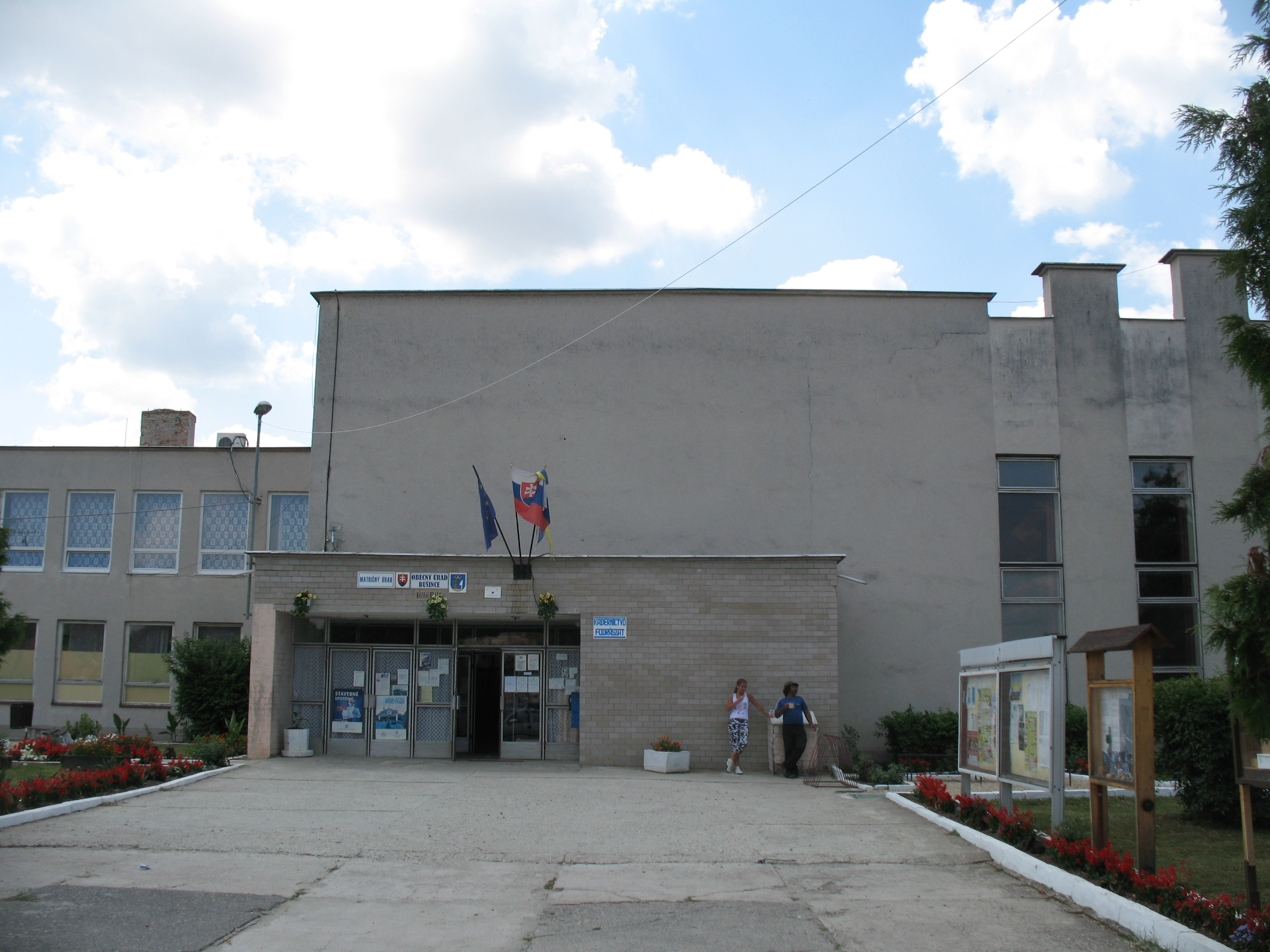 Bussa